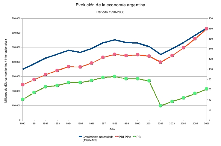 Evolución del PBI (Nominal y PPA) de Argentina entre 1990 y 2005. Según datos del FMI World Economic Outlook (Abril 2006)